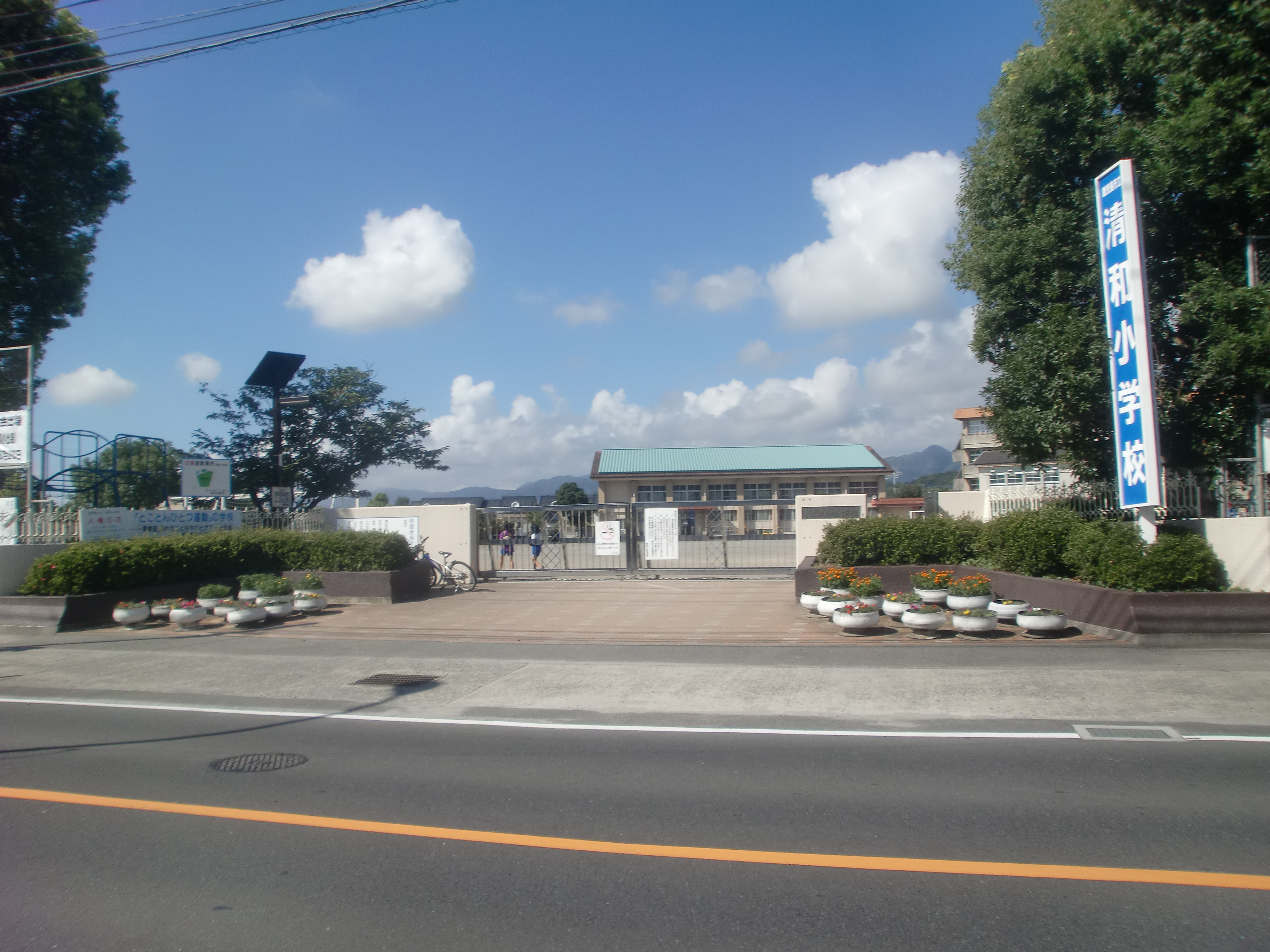 鹿児島市立清和小学校外観。